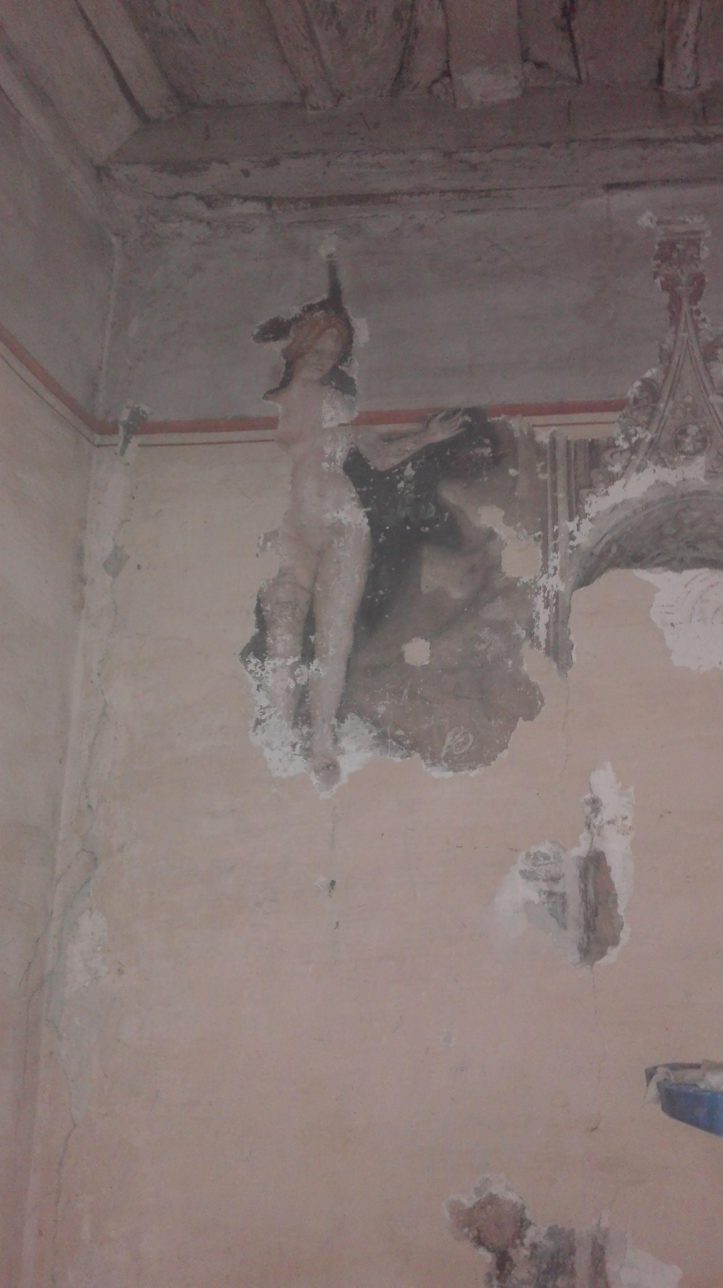 Affresco di Venere (1300 - 1400) in restauro